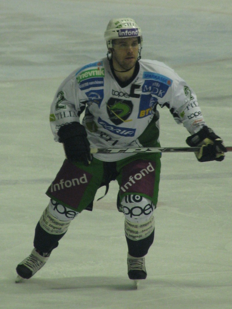 Kevin Mitchell